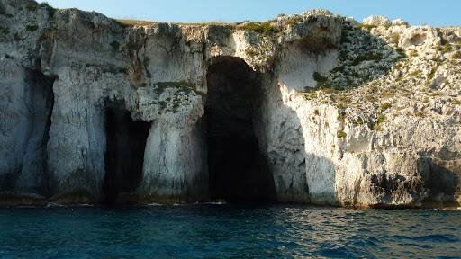 Costa sud orientale Sicilia - Plemmirio